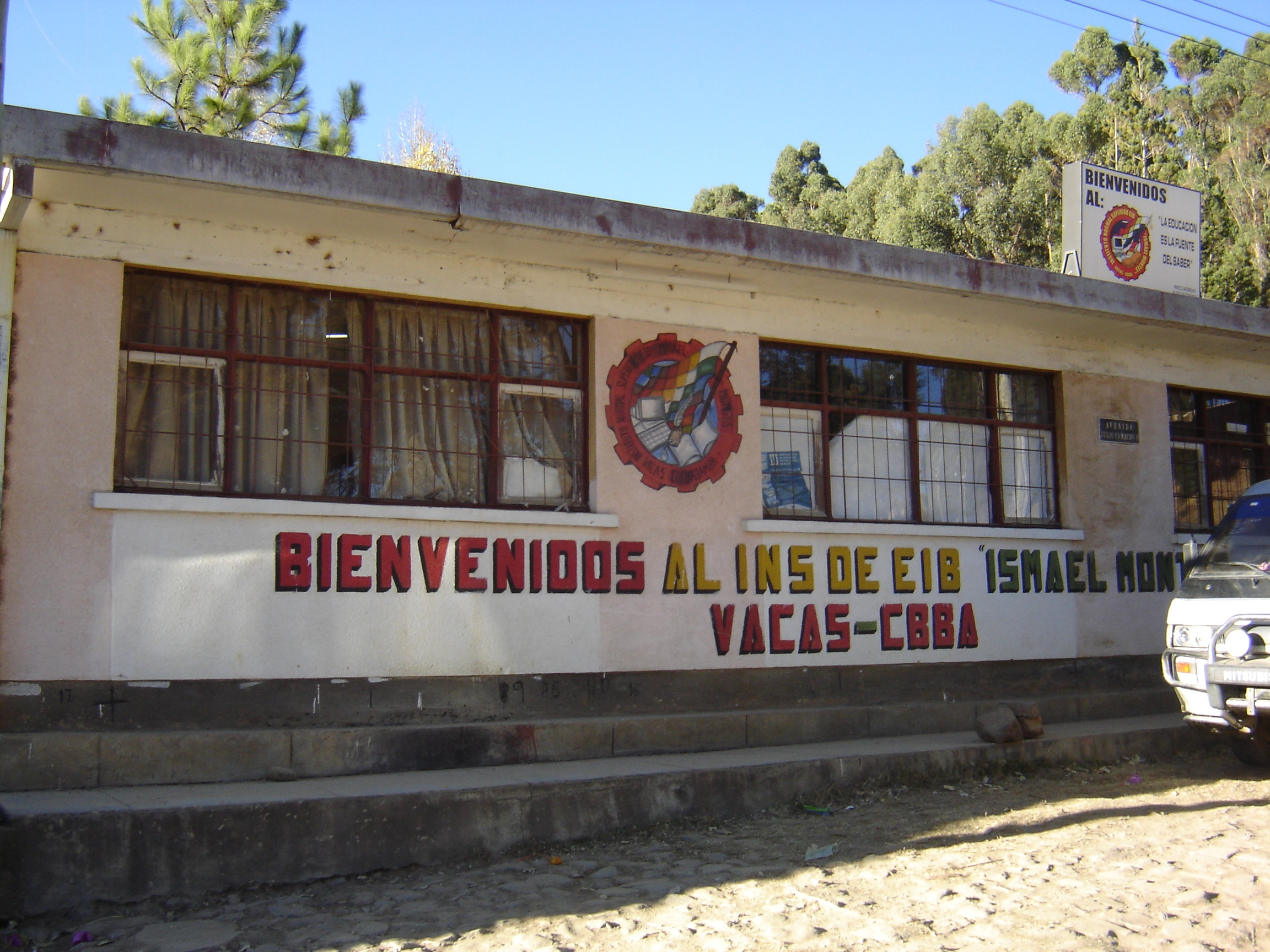 Fachada del Instituto Normal Superior Ismael Montes, de Educación Intercultural Bilingue, en la Comunidad de Challwamayu; mas conocida como la Normal de Vacas.